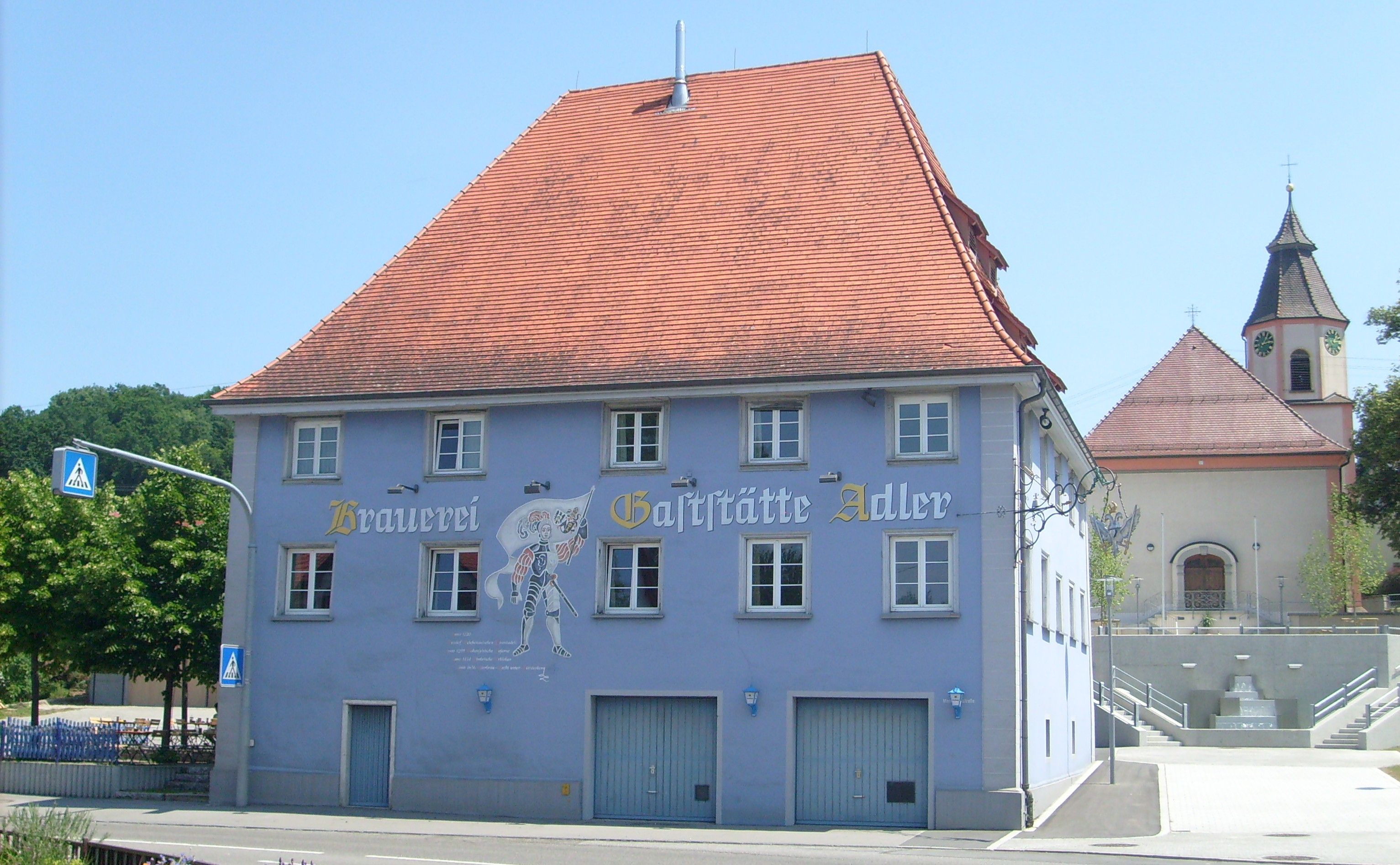 Bildvordergund: Gögginger Gasthaus Adler; Bildhintergrund: St. Nikolaus Kirche